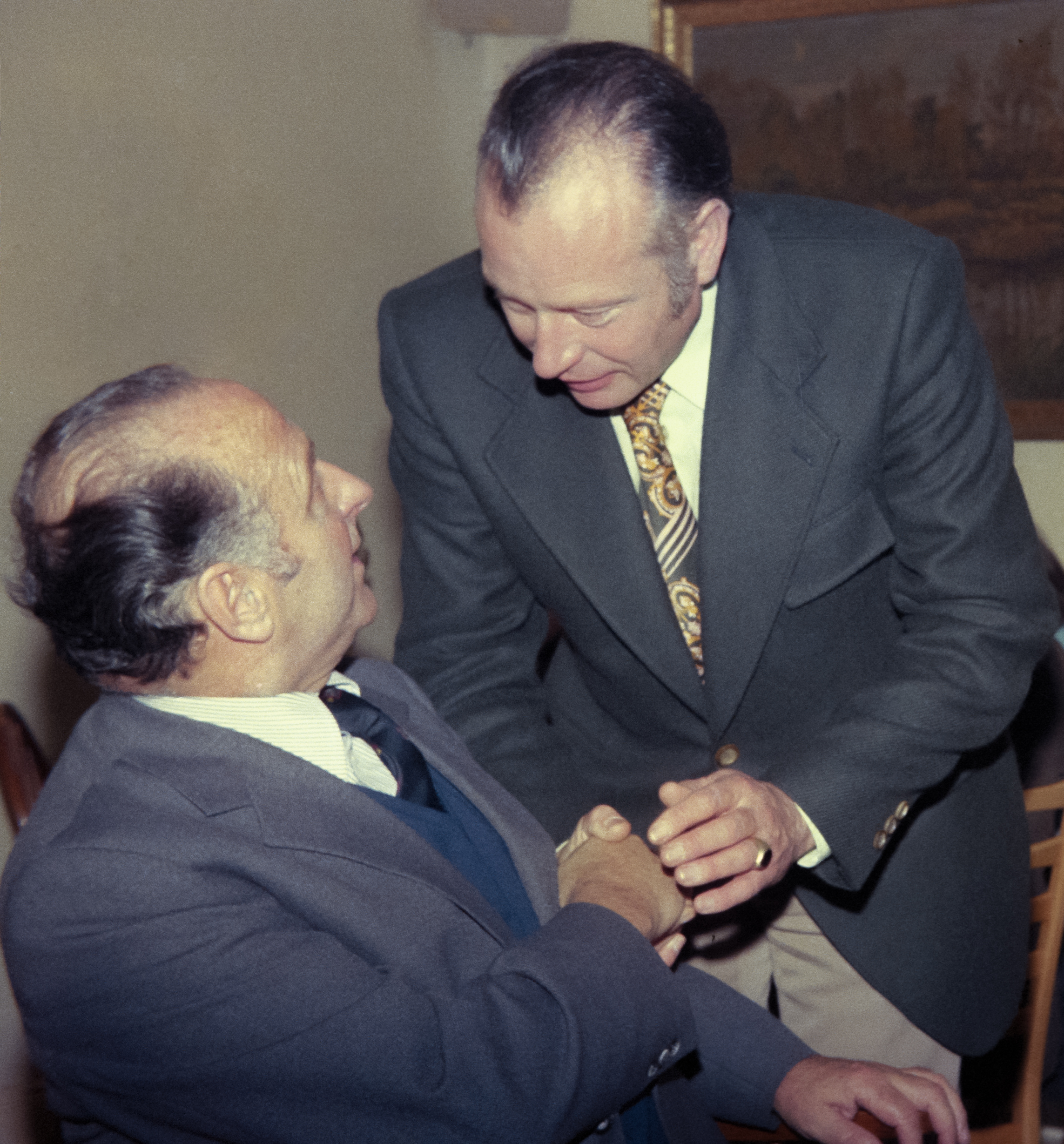 Begegung Senator Ernst Weiß (links) und Bürgerschaftsabgeordneter Adalbert Höhne